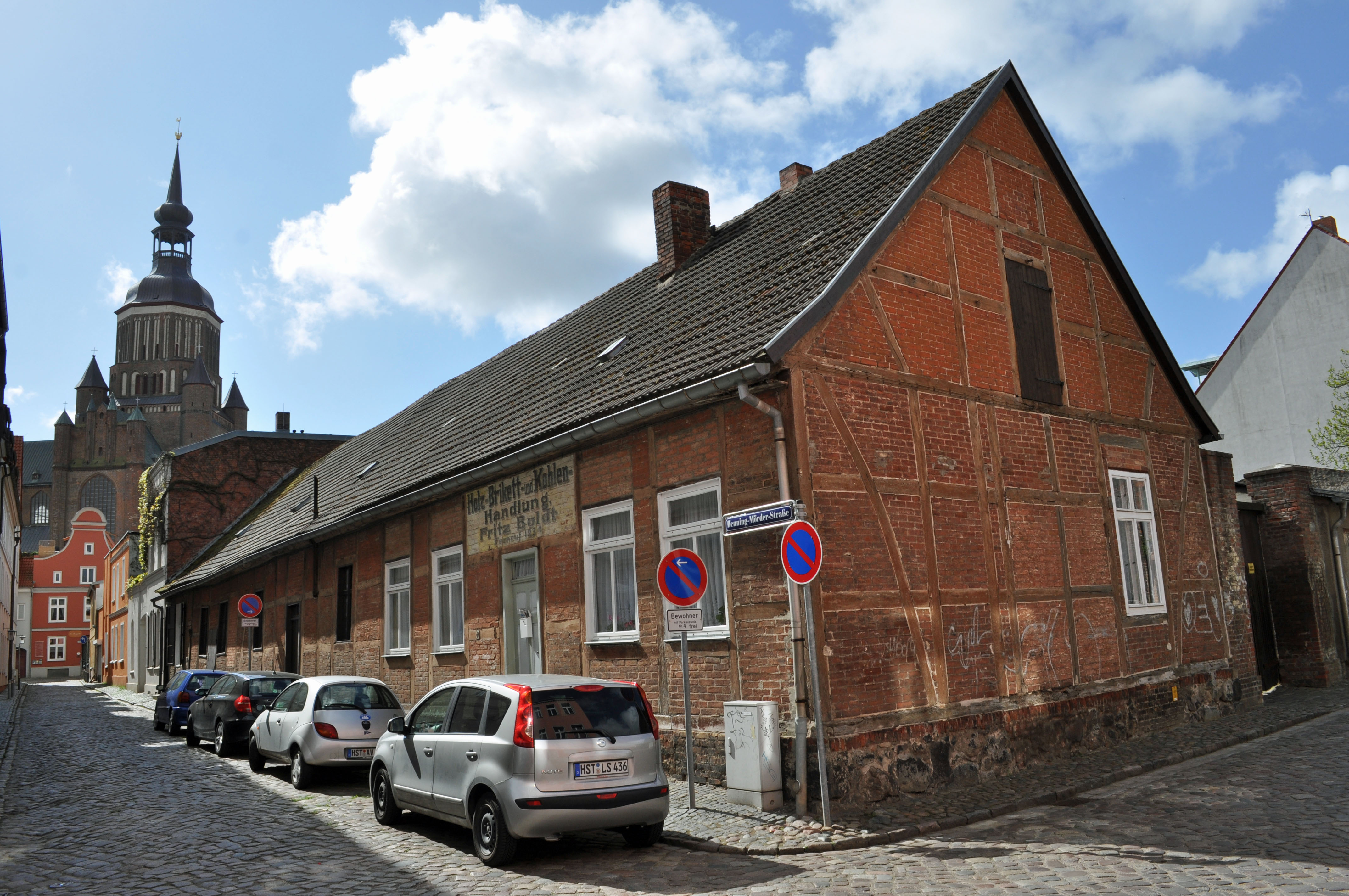 Gebäude in Stralsund, siehe Dateiname